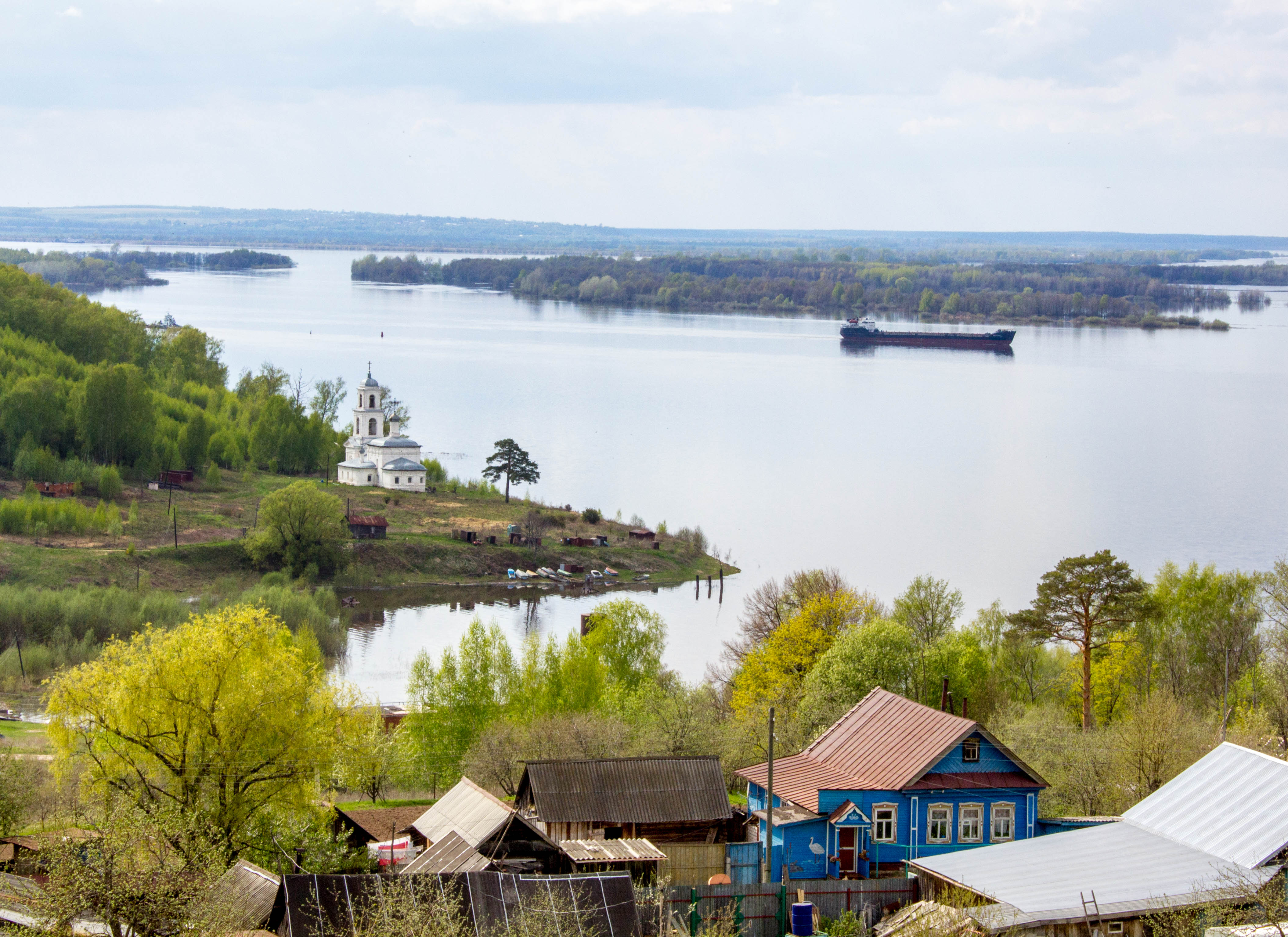 Церковь на берегу